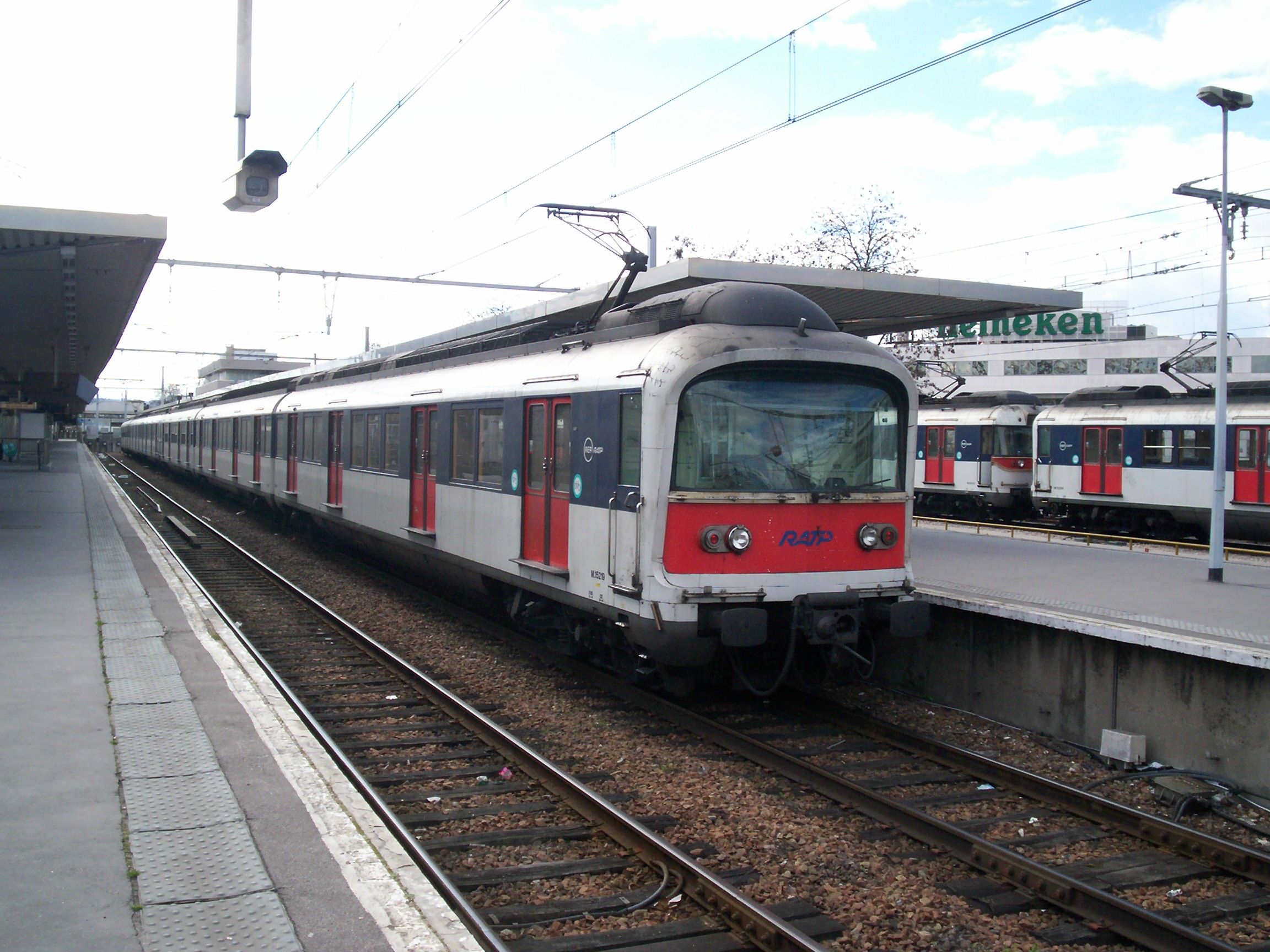 MS61 - Gare de Rueil-Malmaison